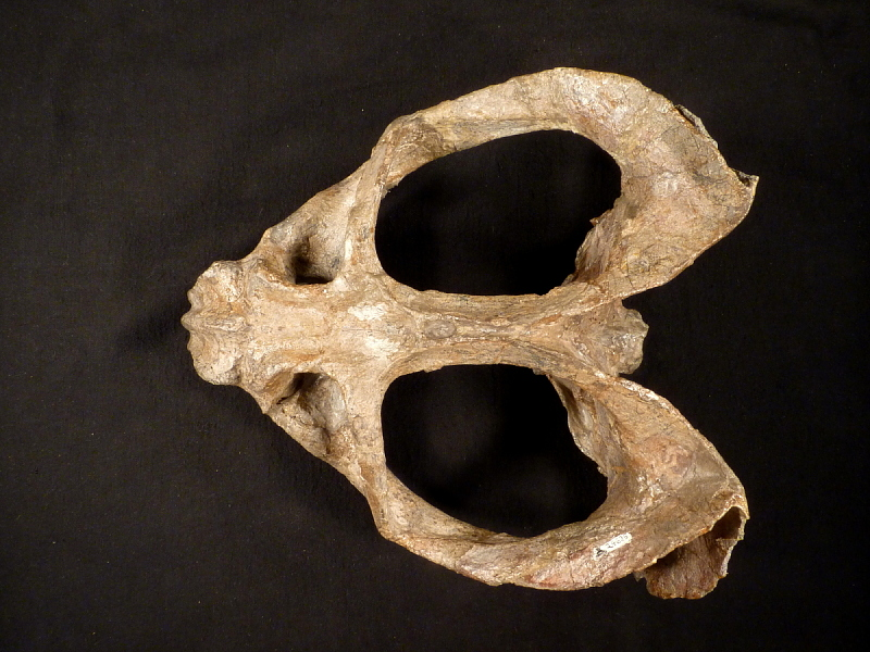 Oudenodon bainii Owen, 1860